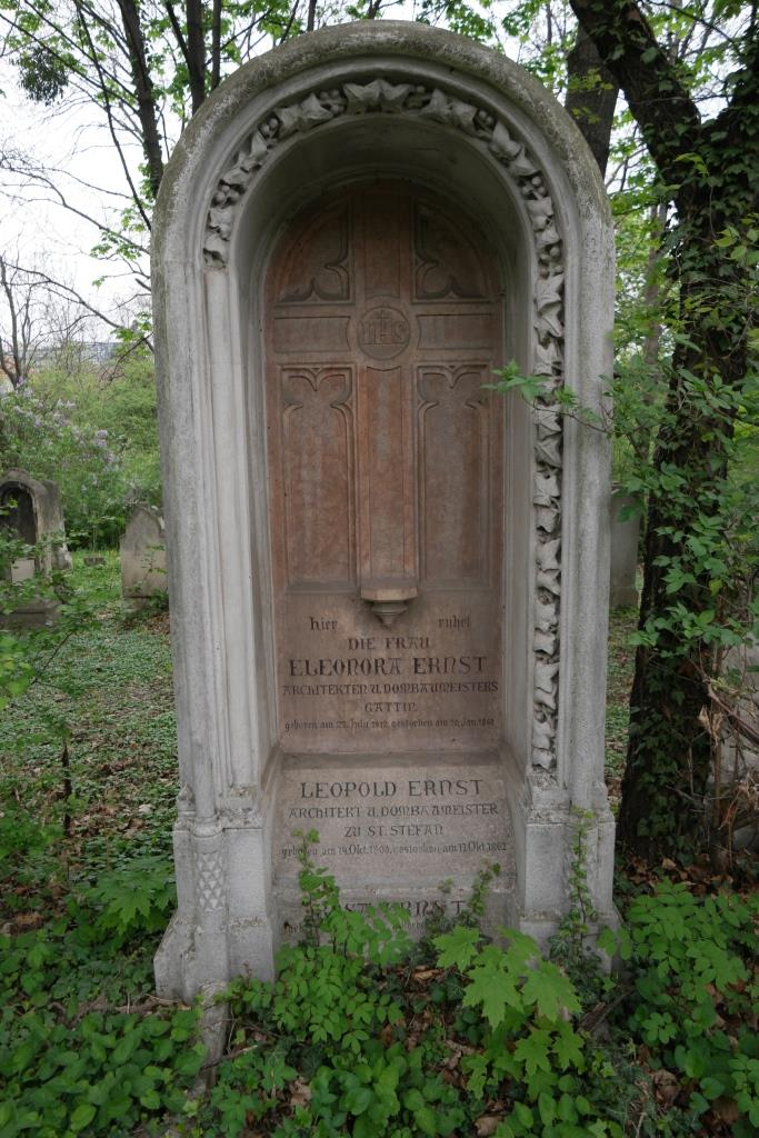 Grabmal des österreichischen Architekten Leopold Ernst (1808-1862) auf dem Friedhof St. Marx in Wien